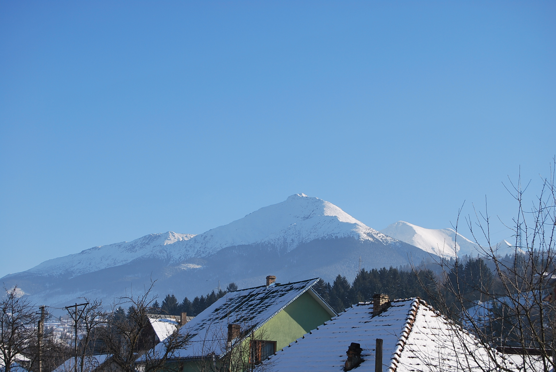 Pietrosul Rodnei, văzut din Moisei, iarna